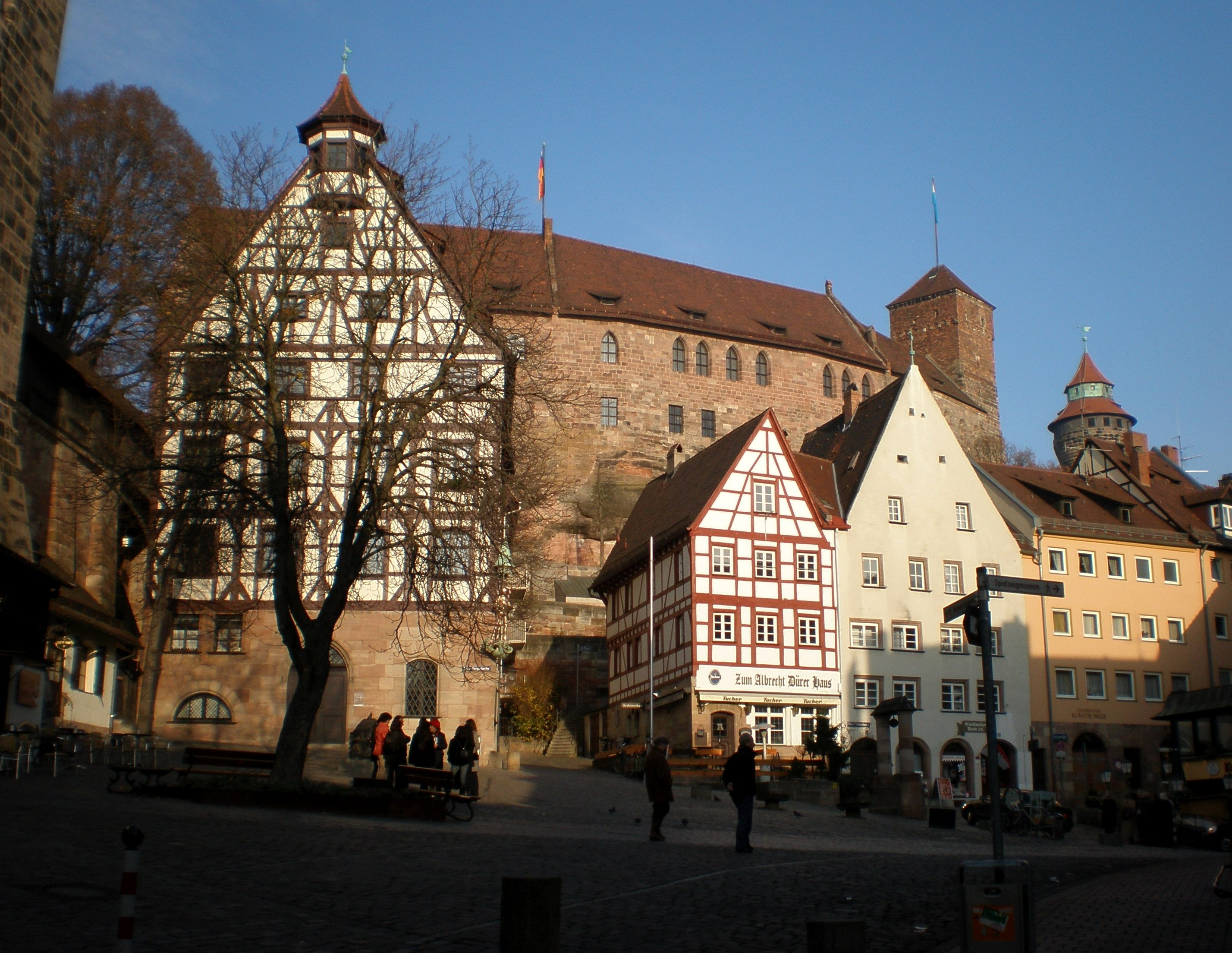 Das Pilatushaus am Tiergärtnertorplatz in Nürnberg. Im Hintergrund: Nürnberger Burg